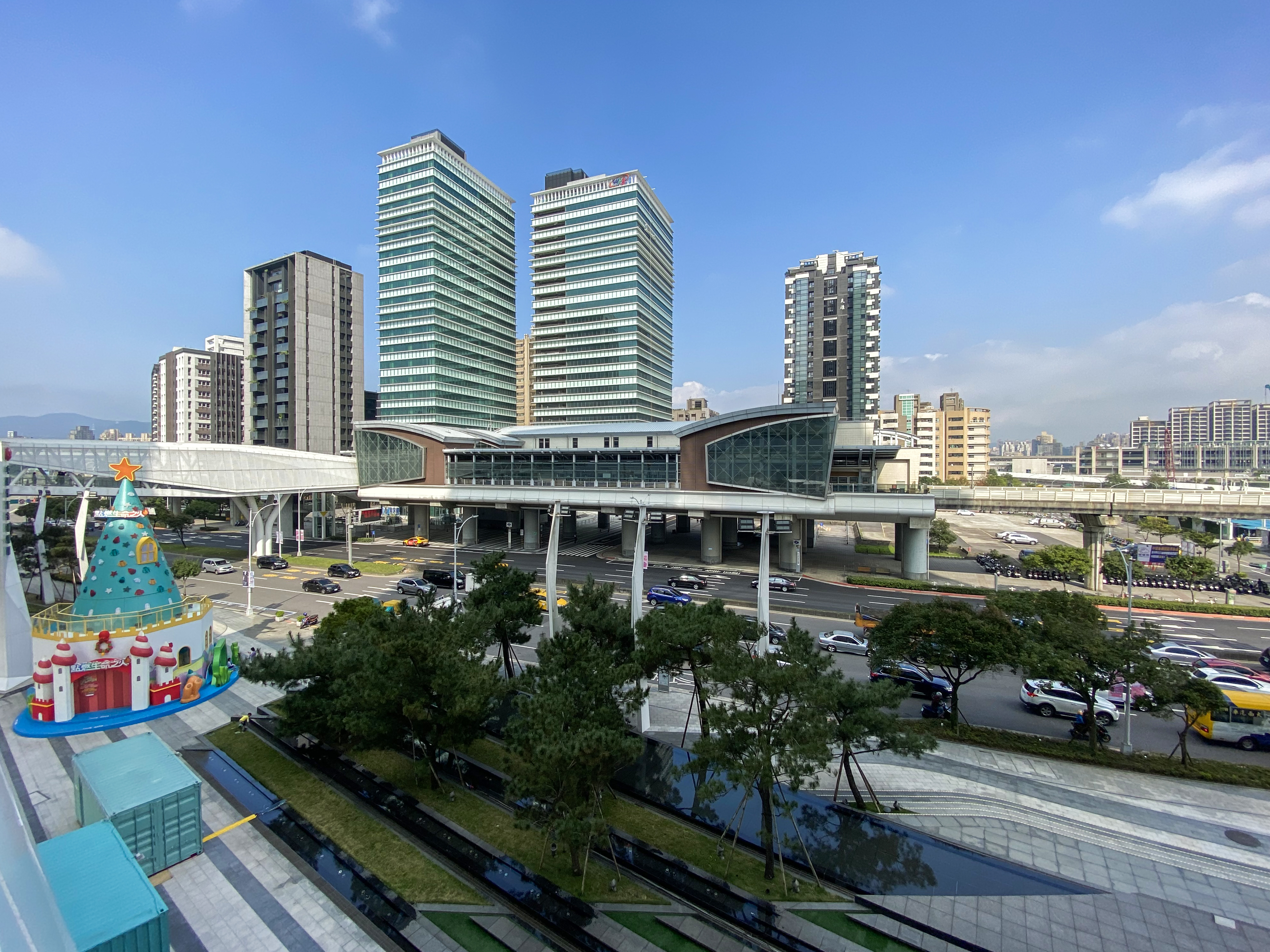 Nangang Software Park Station